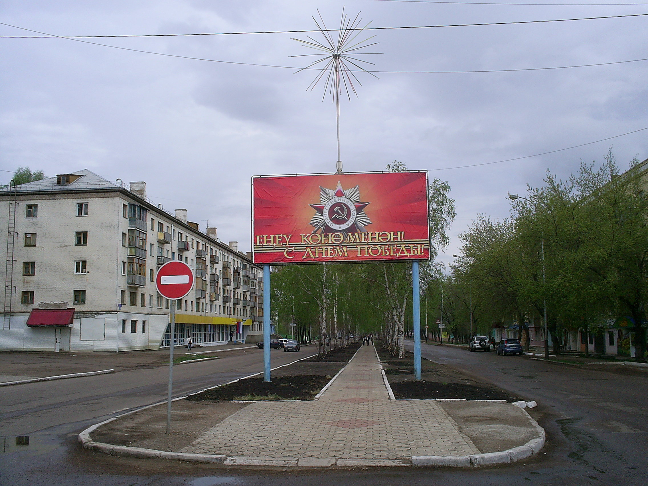 Щит на русском и башкирском языках «С днём Победы!» в городе Ишимбае.